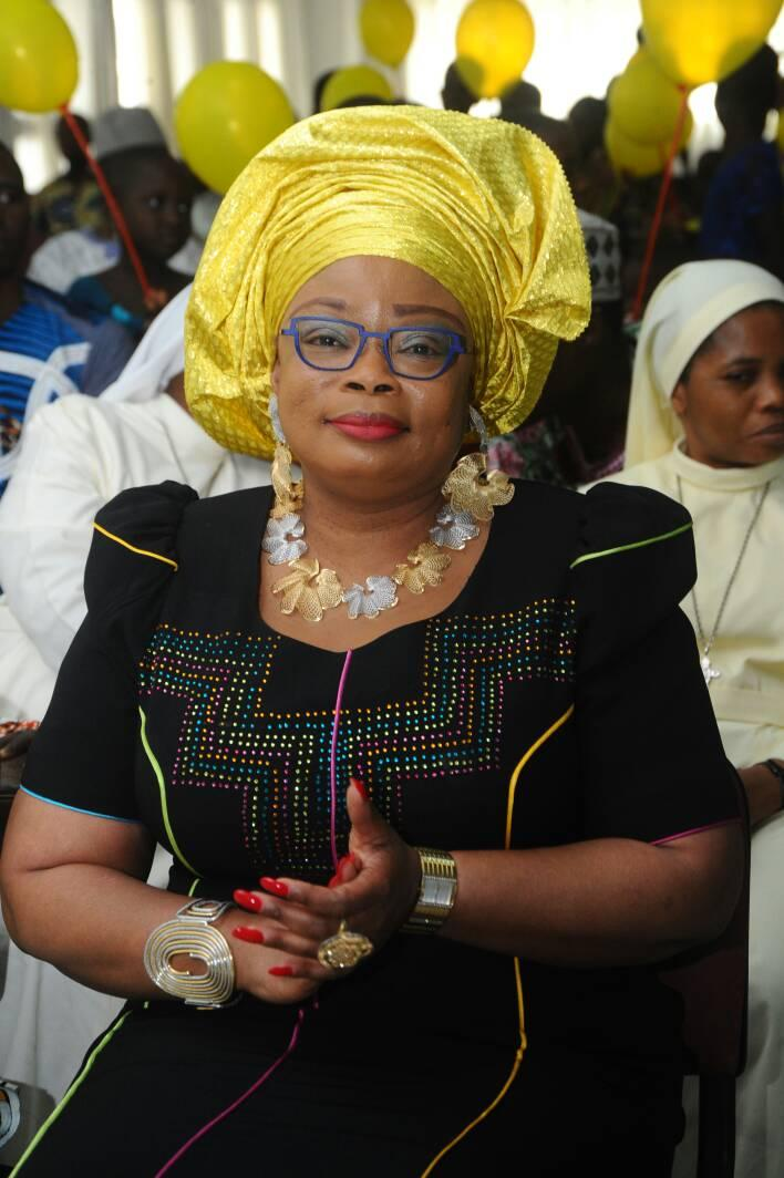 Claudine Afiavi PRUDENCIO